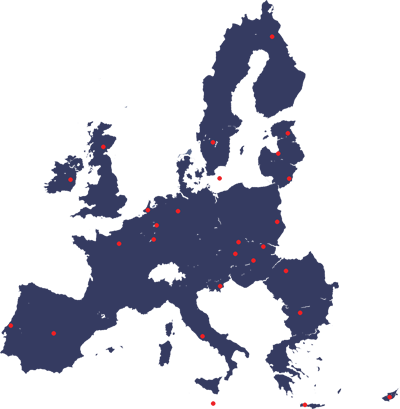 Map of 2010 winners - European Commission translation contest: Juvenes Translatores